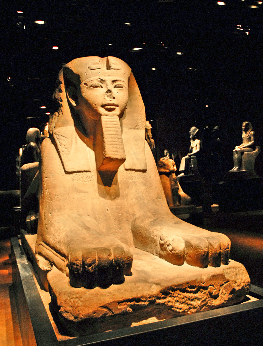 Sphinx initialement situé à l'entrée du temple du Dieu Khonsu dans la cour du temple de Mut au sud de Karnak. 20ème dynastie, règne de Ramses III (1186-1155 av. J.C.) La sculpture a été trouvée en 1818 par Rifaud, pour Drovetti qui a rassemblé à cette époque une importante collection d'objets égyptiens pour le compte de musées occidentaux.